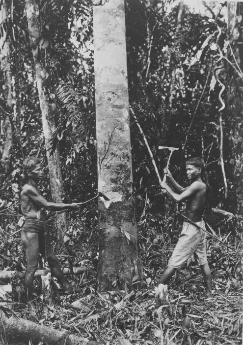 foto. Dajak mannen hakken een boom om, Borneo.